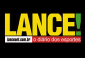 Logo von Lance! (Brazilian sports newspaper)